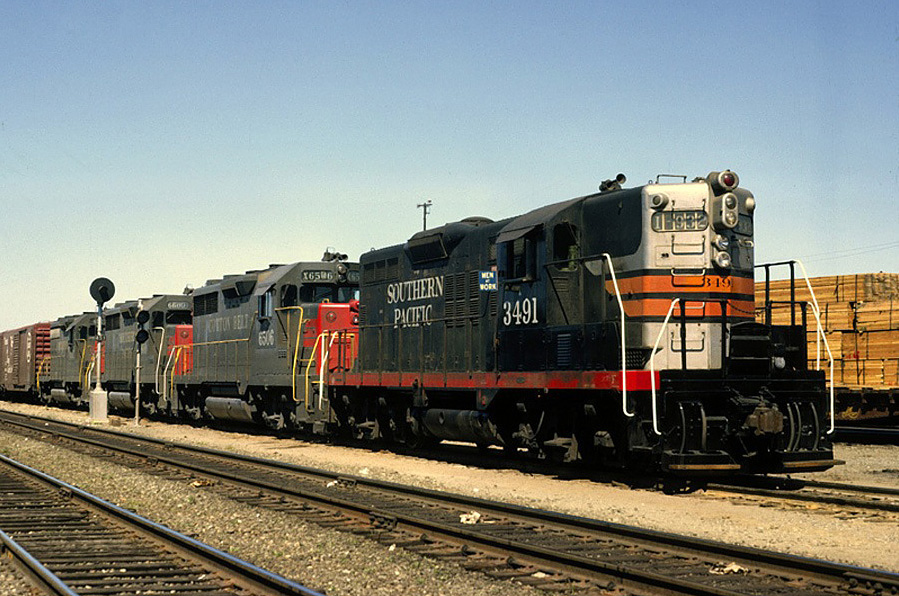 3491 newhqll april 66